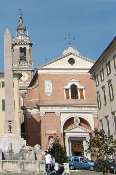 Cattedrale di San Settimio